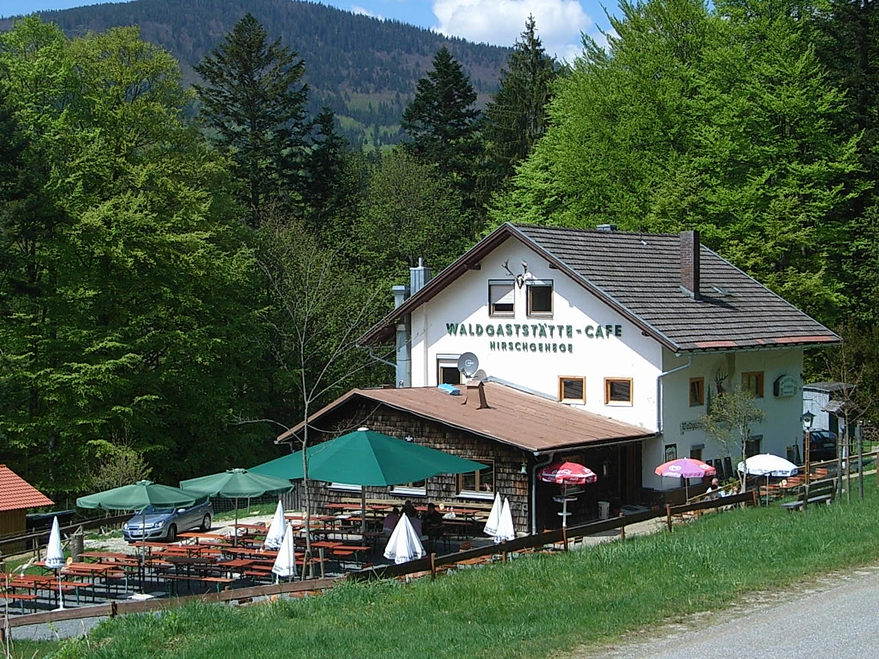 Die Waldgaststätte Scheuereck